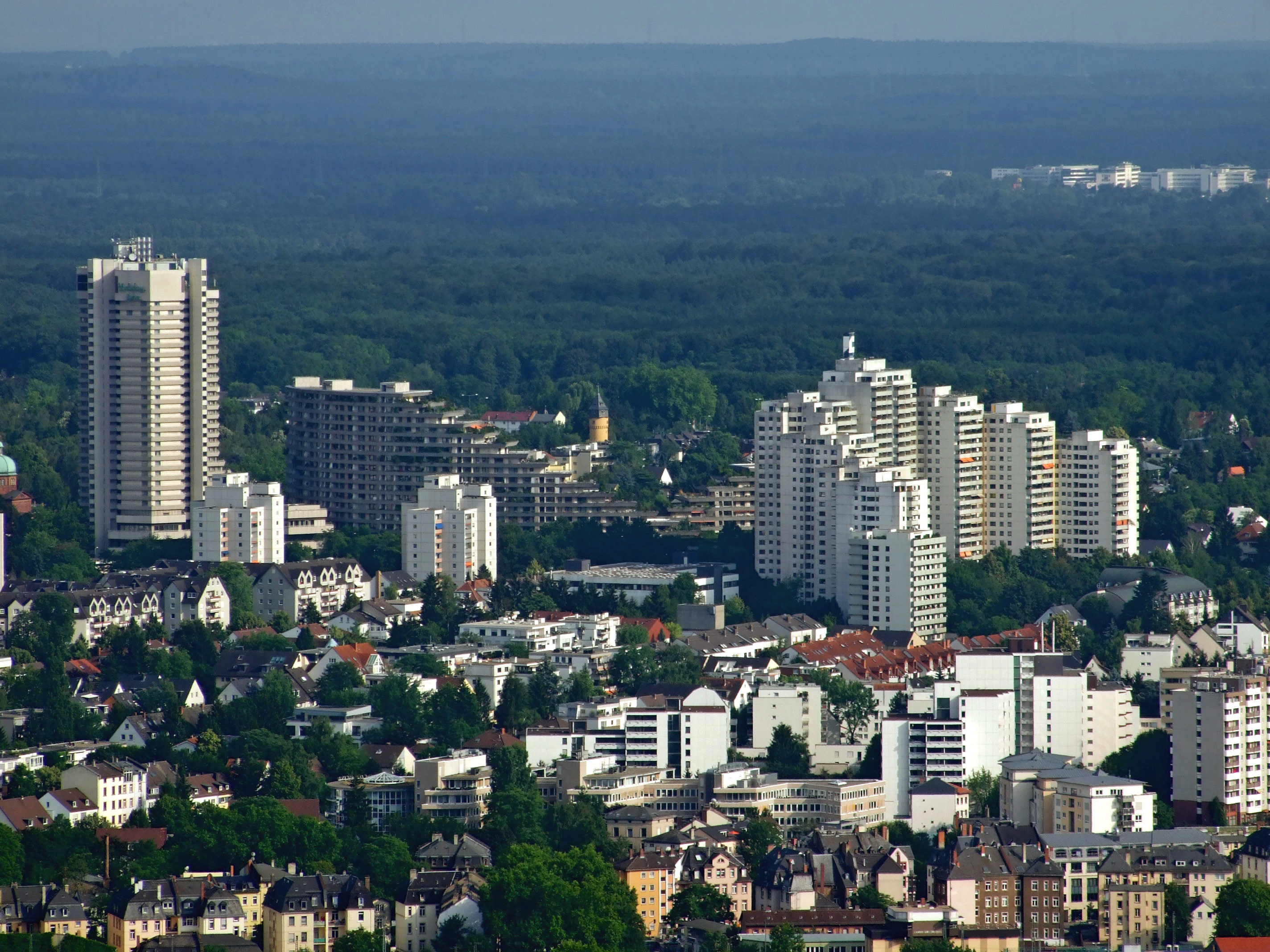 Hochhaeuser vor der Sachsenhaeuser-Warte in Ffm